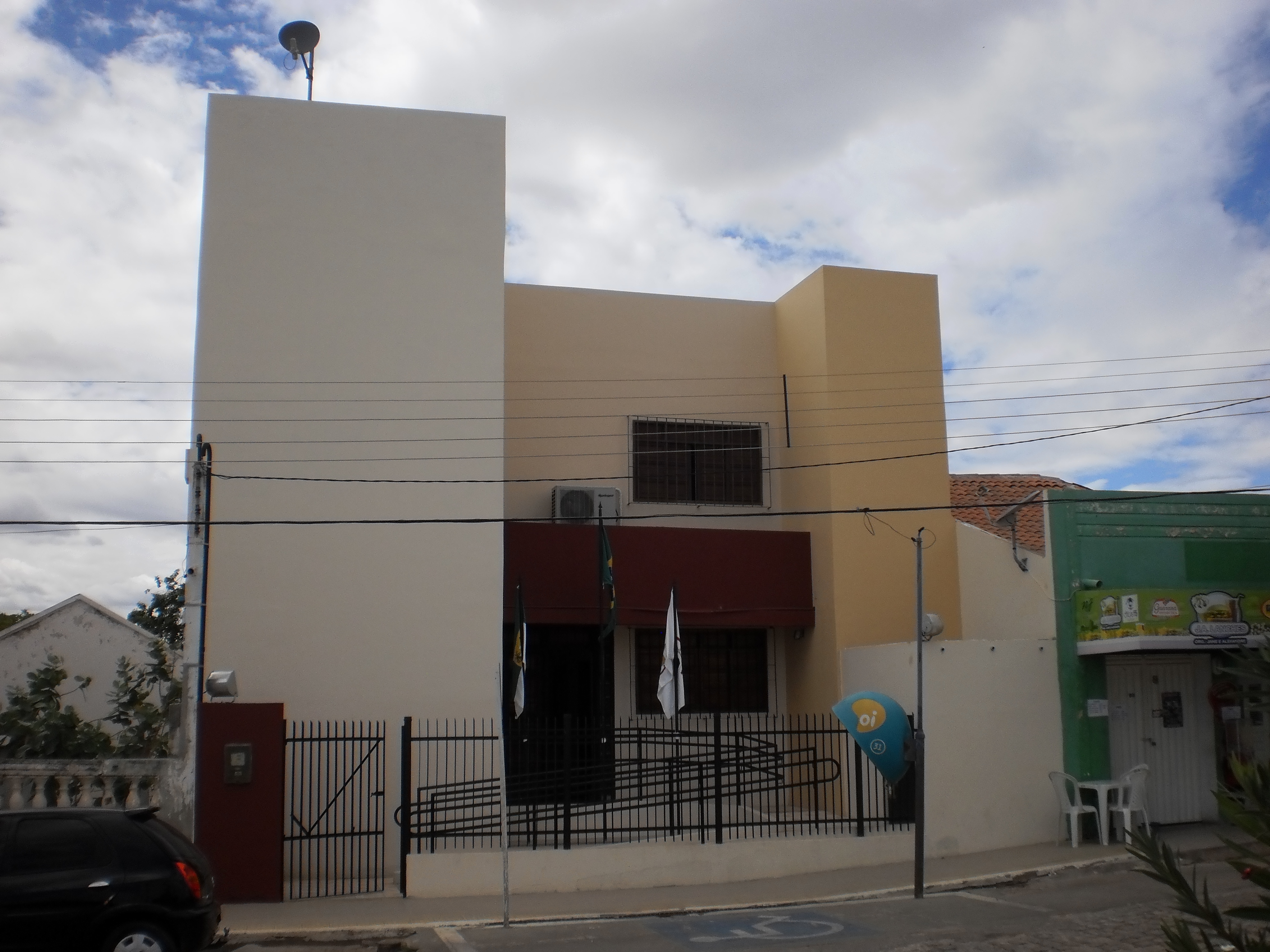 Fórum da Comarca de Umarizal, do Poder Judiciário do Rio Grande do Norte, Brasil.